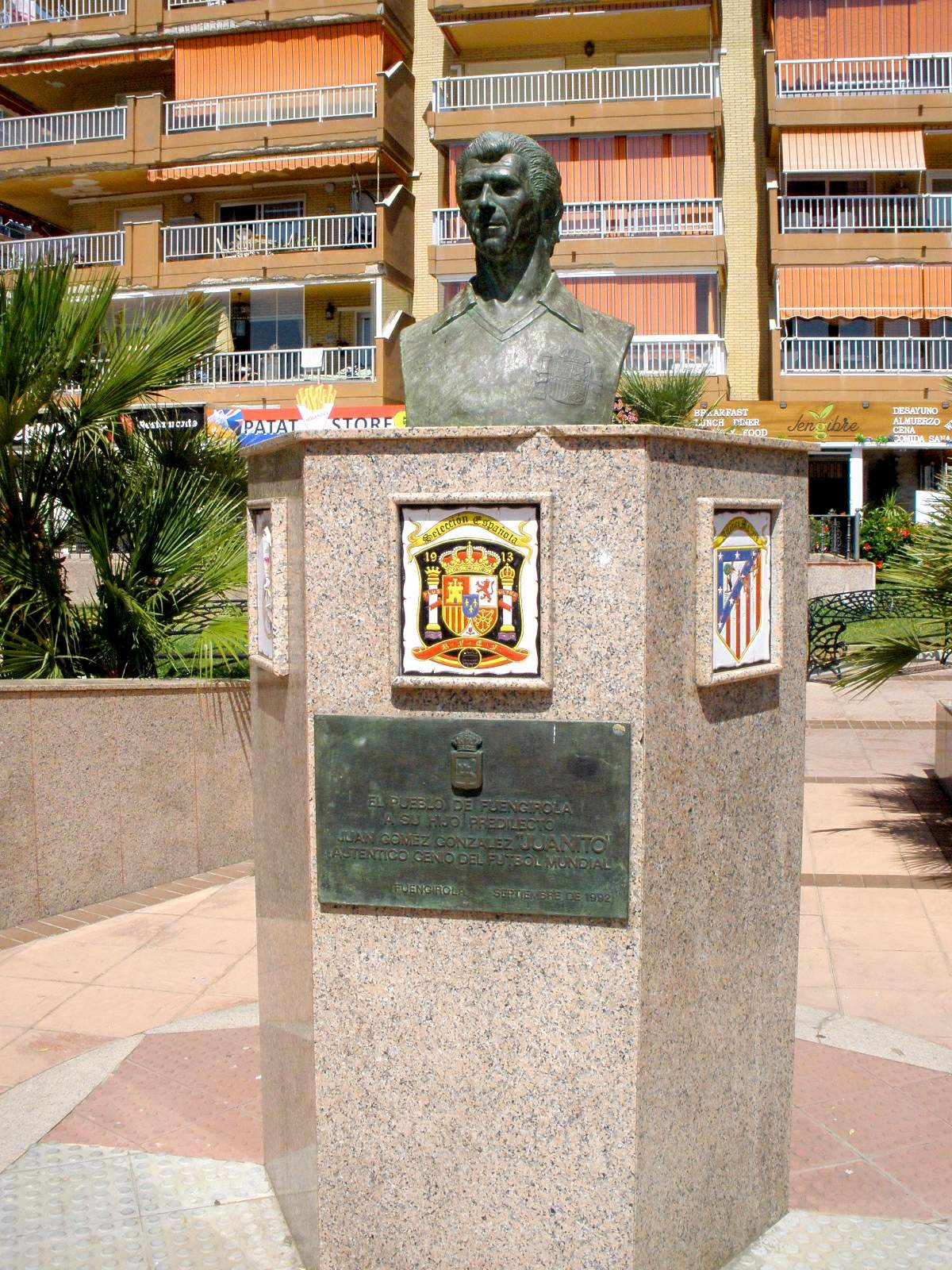 Monumento Juan Gómez González, 'Juanito', en su Fuengirola natal